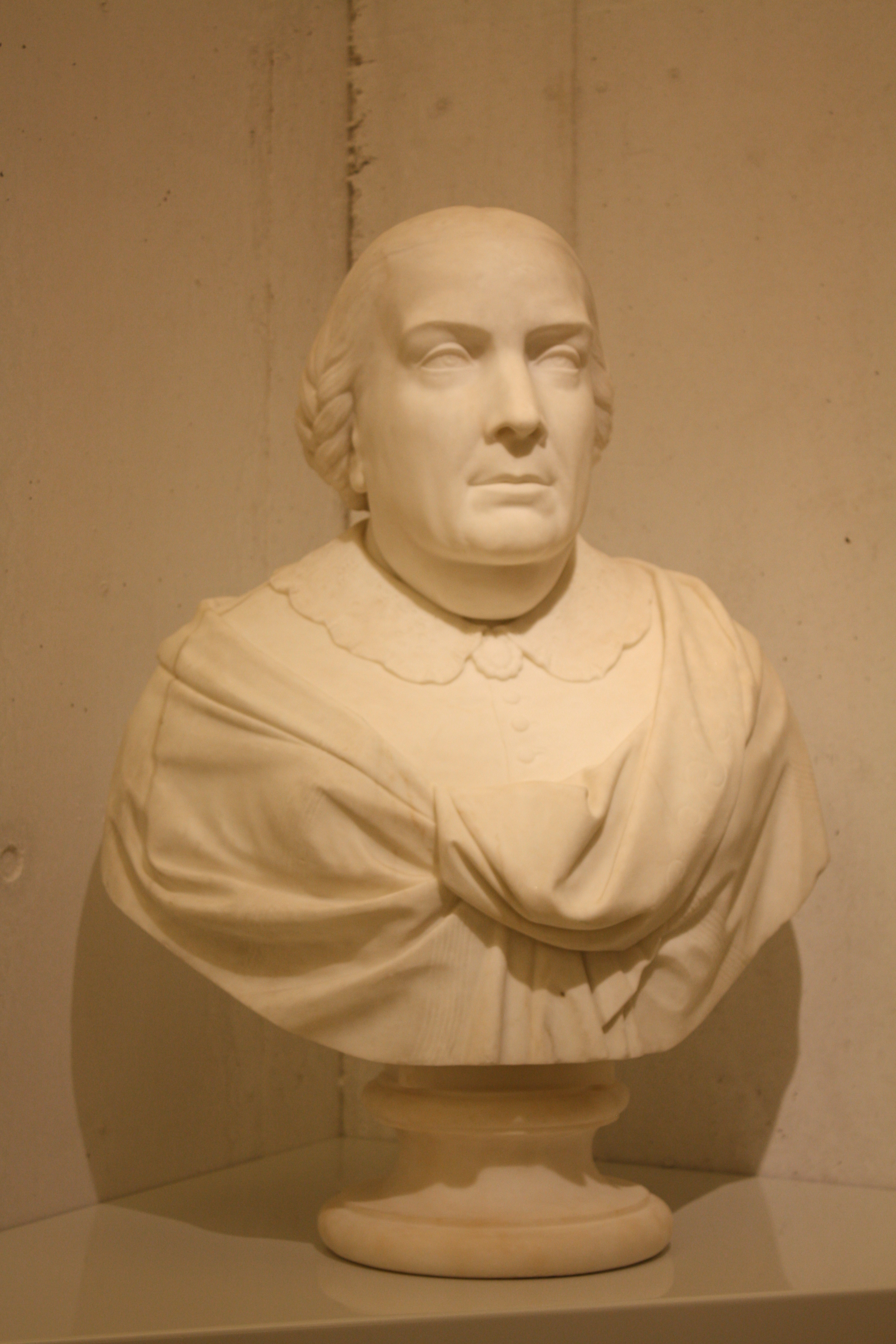 Busto de Concepción Arenal (mármore, 1866). Obra de Eugenio Duque y Duque, exposta no Museo de Pontevedra.